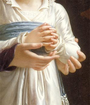 Peinture (detail)